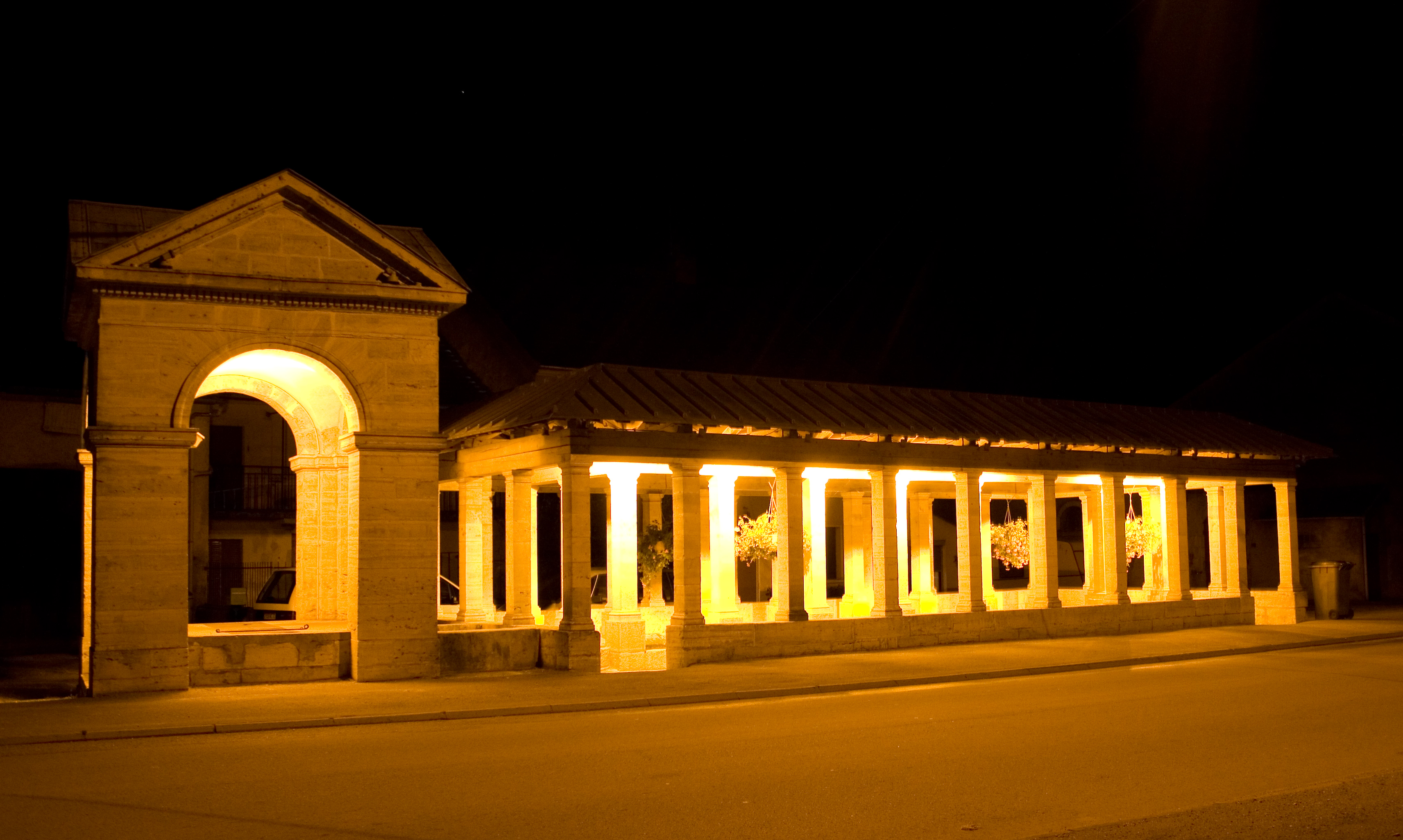 Lavoir à Oyrières en Haute-Saone